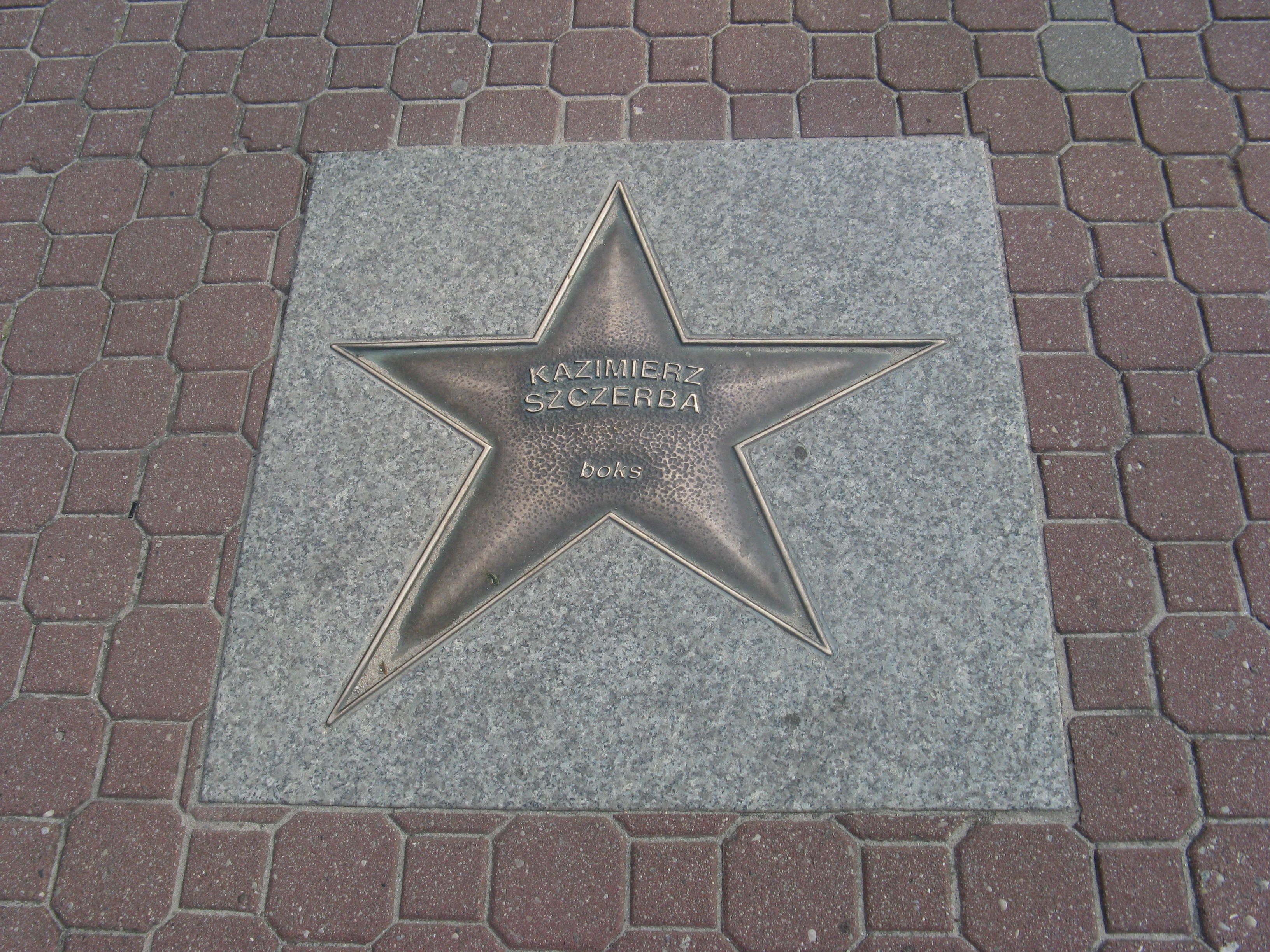 Gwiazda w Alei Gwiazd sportu we Władysławowie